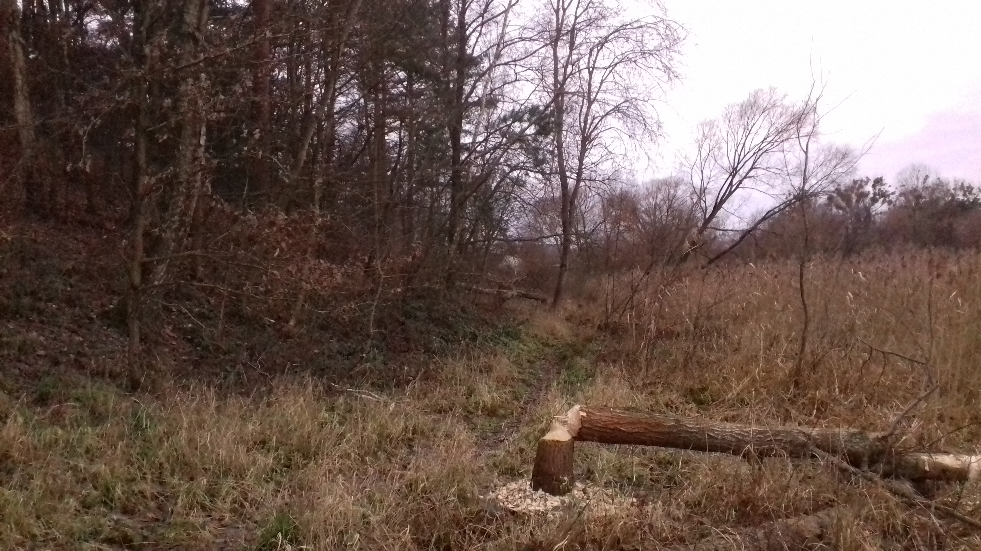 Szlak niebieski w lesie na obrzeżach Skrzynek